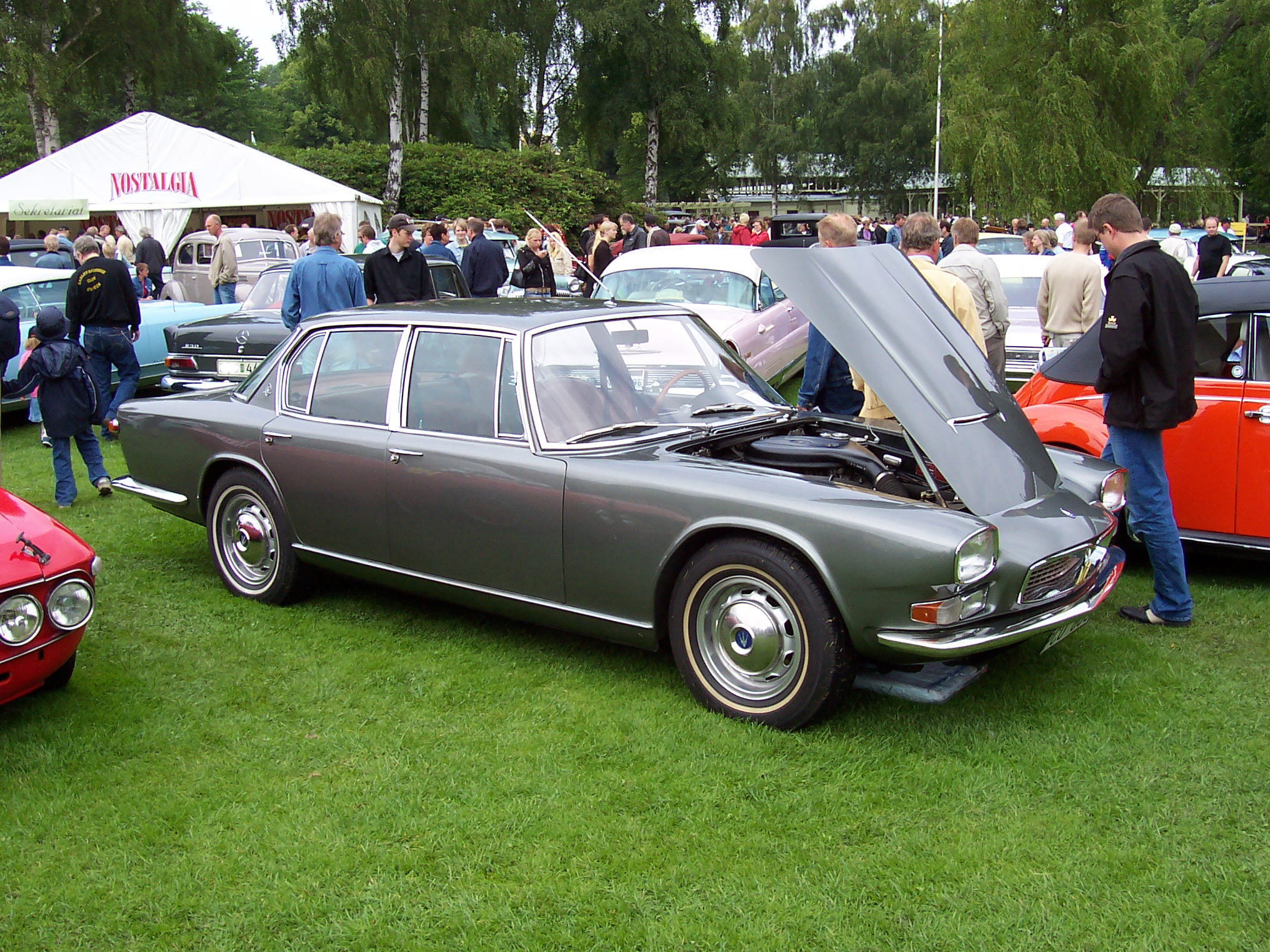 Maserati Quattroporte I serie del 1964